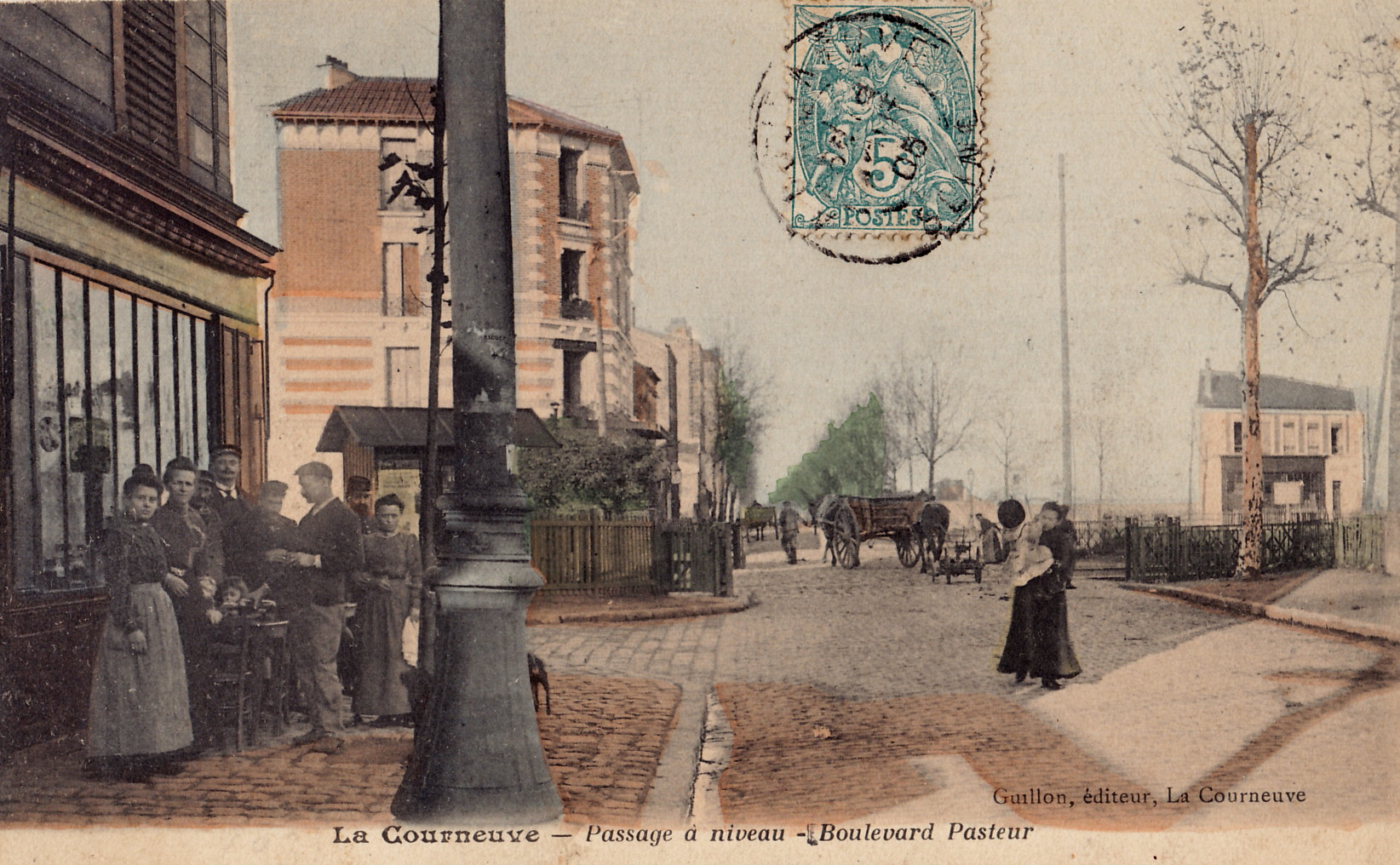 Carte postale ancienne éditée par Guillon à La Courneuve :LE COURNEUVE -Passage à niveau - Boulevard Pasteur